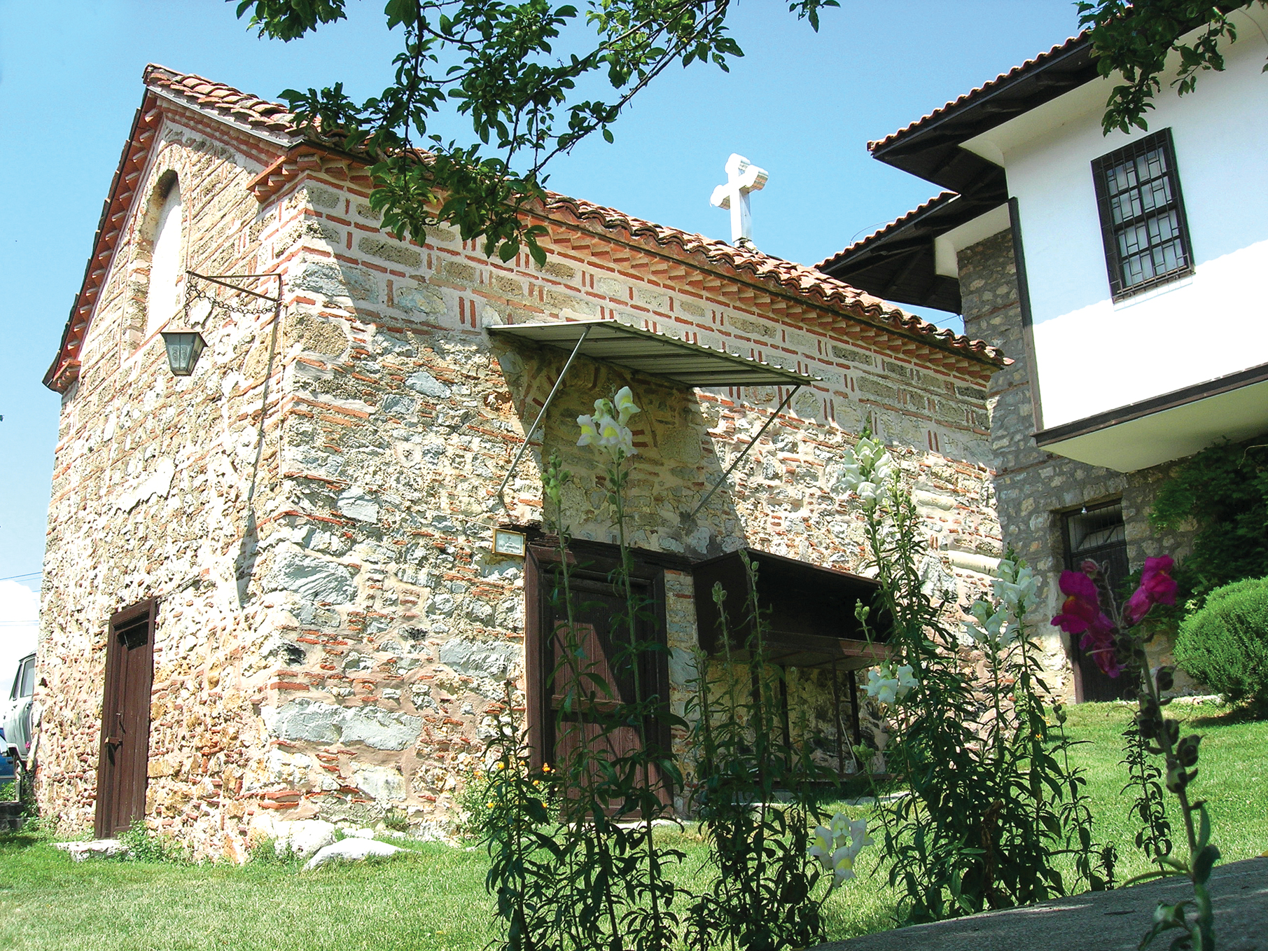 Църквата „Свети Димитър“ в Охрид, Република Македония.